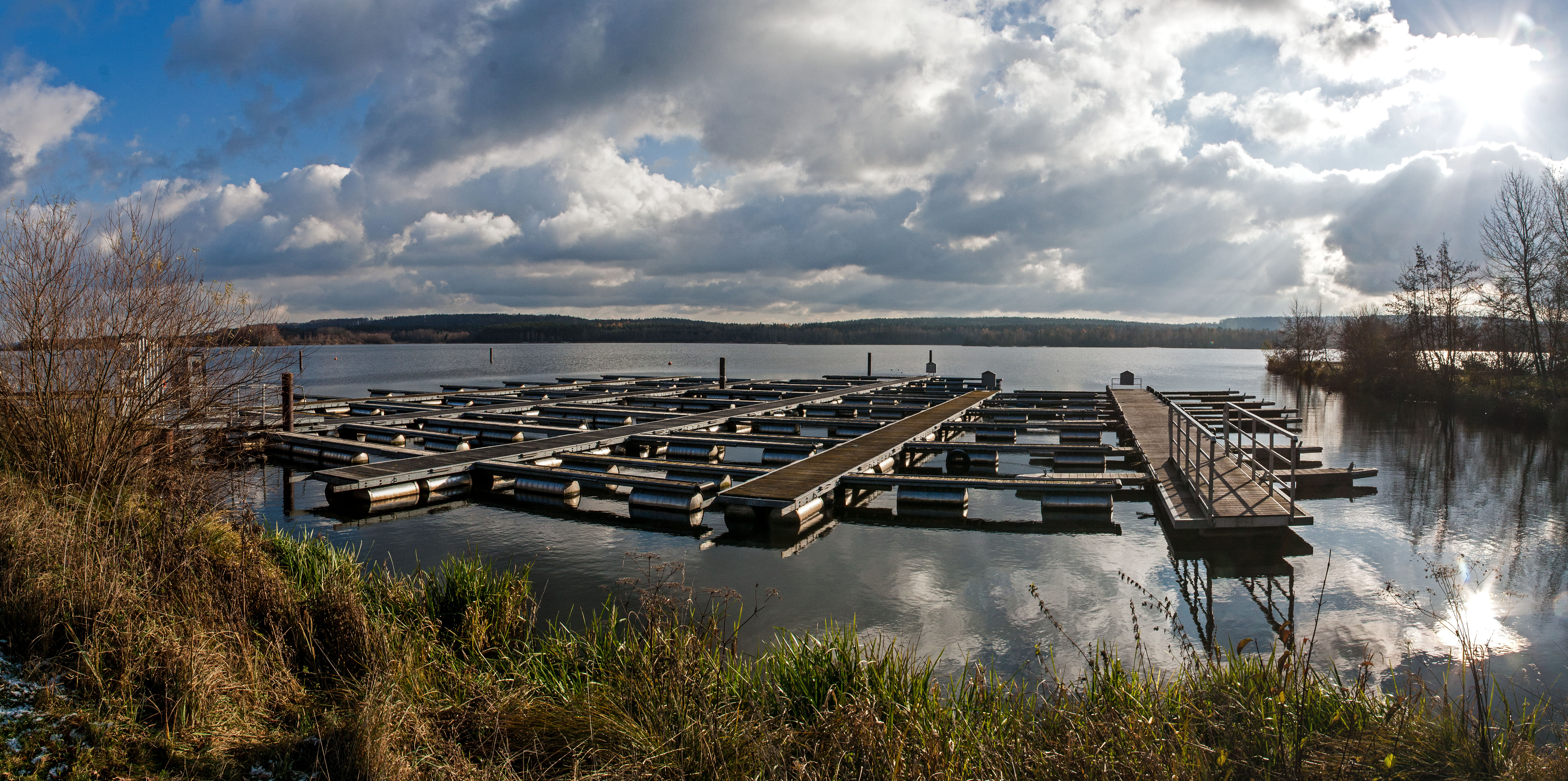 Kleiner Brombachsee, Südufer, Bootsanlegehafen